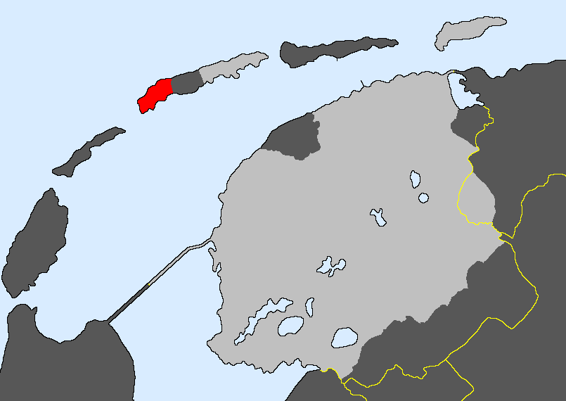 Nedersaksies: t Taelgebied van t Westerskellings